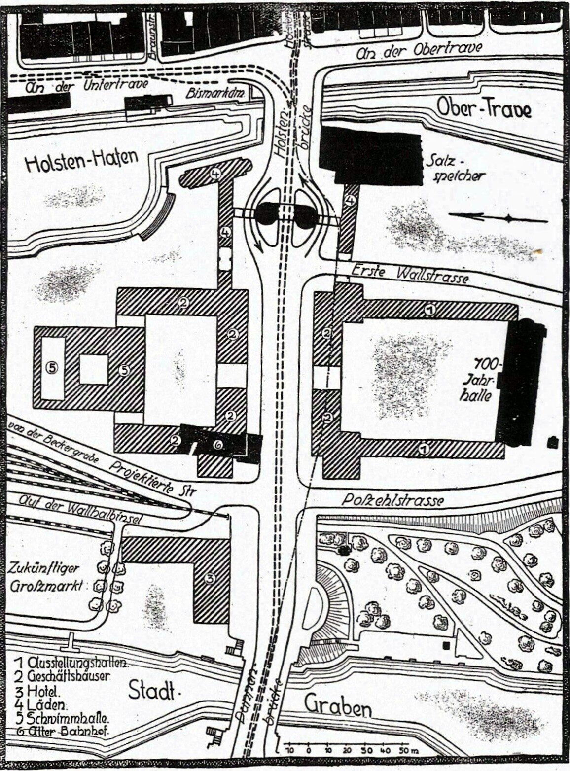 1929 von Pieper überarbeiteter Vorschlag zur Umgestaltung des Holstentorvorplatzes von 1914.